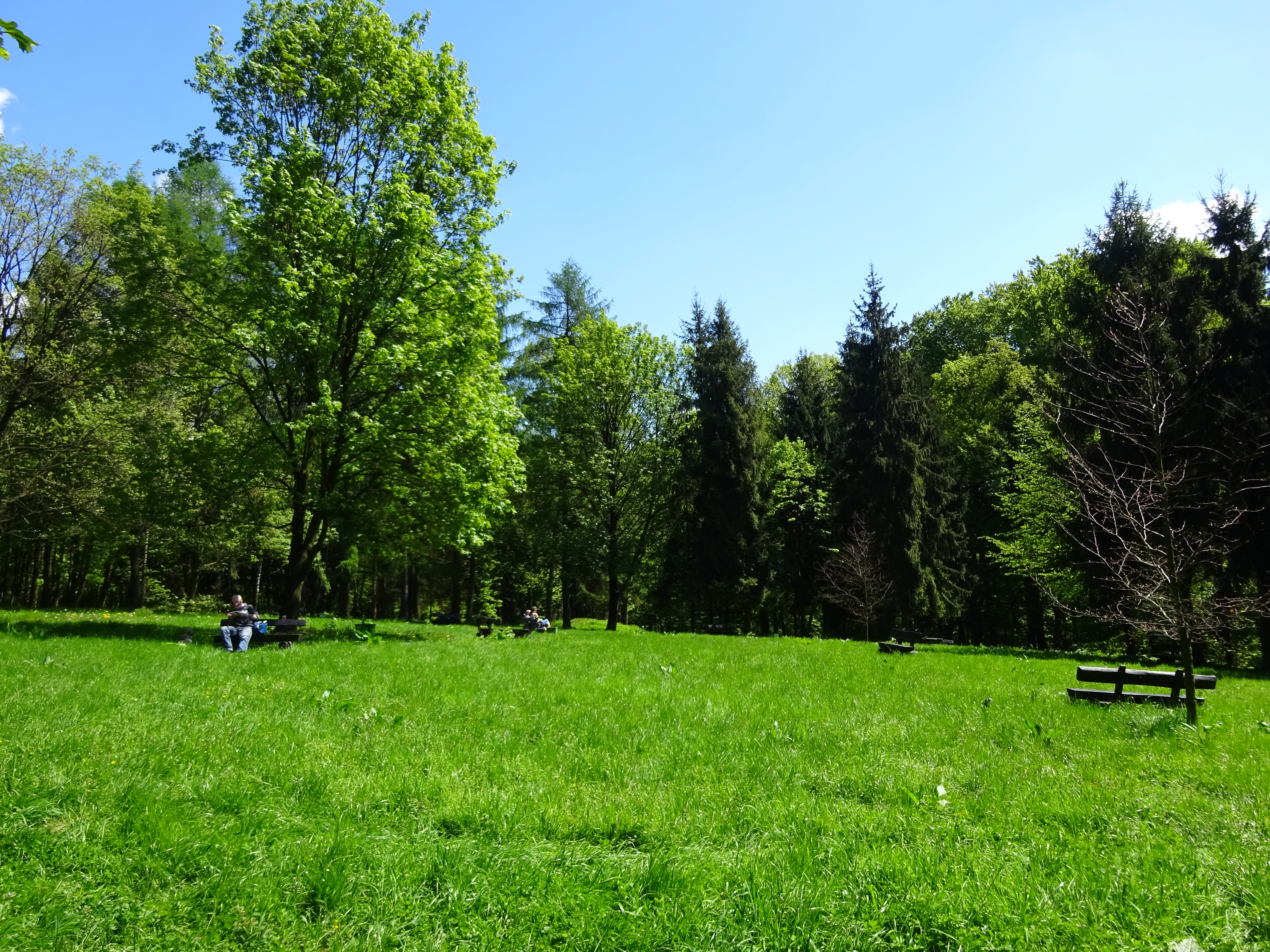 Polana Jacka Malczewskiego na szczycie wzgórza Pustelnik w Lesie Wolskim w Krakowie.